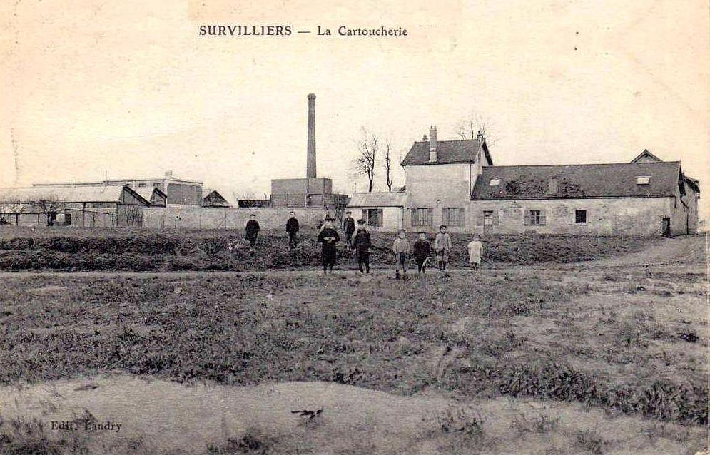 La Cartoucherie Française à Survilliers (95) peu après sa création; installée dans une ancienne ferme visible sur l'image et toujours existante.